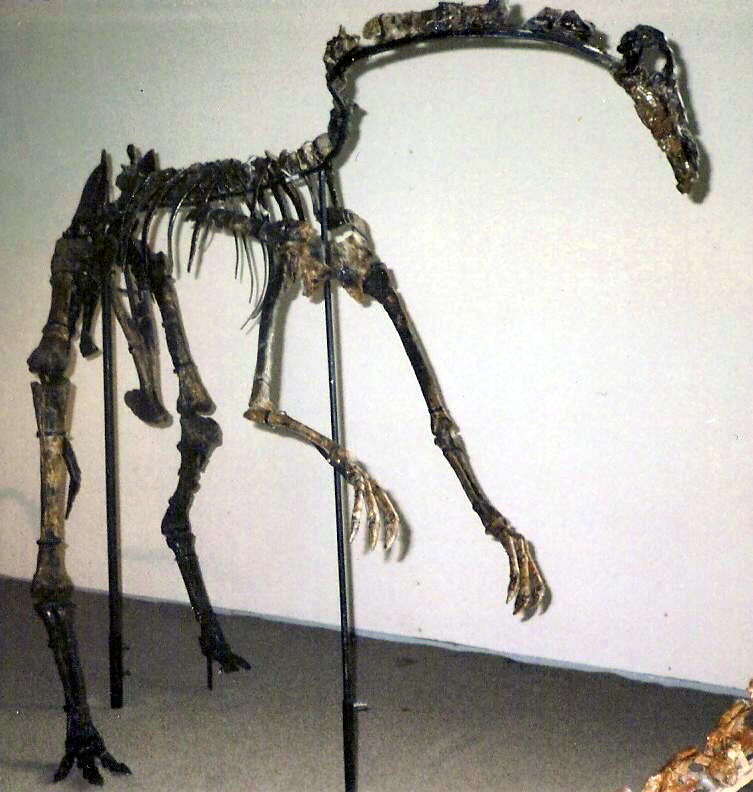 Gallimimus bullatus holotype skeleton. Experimentarium, Hellerup.